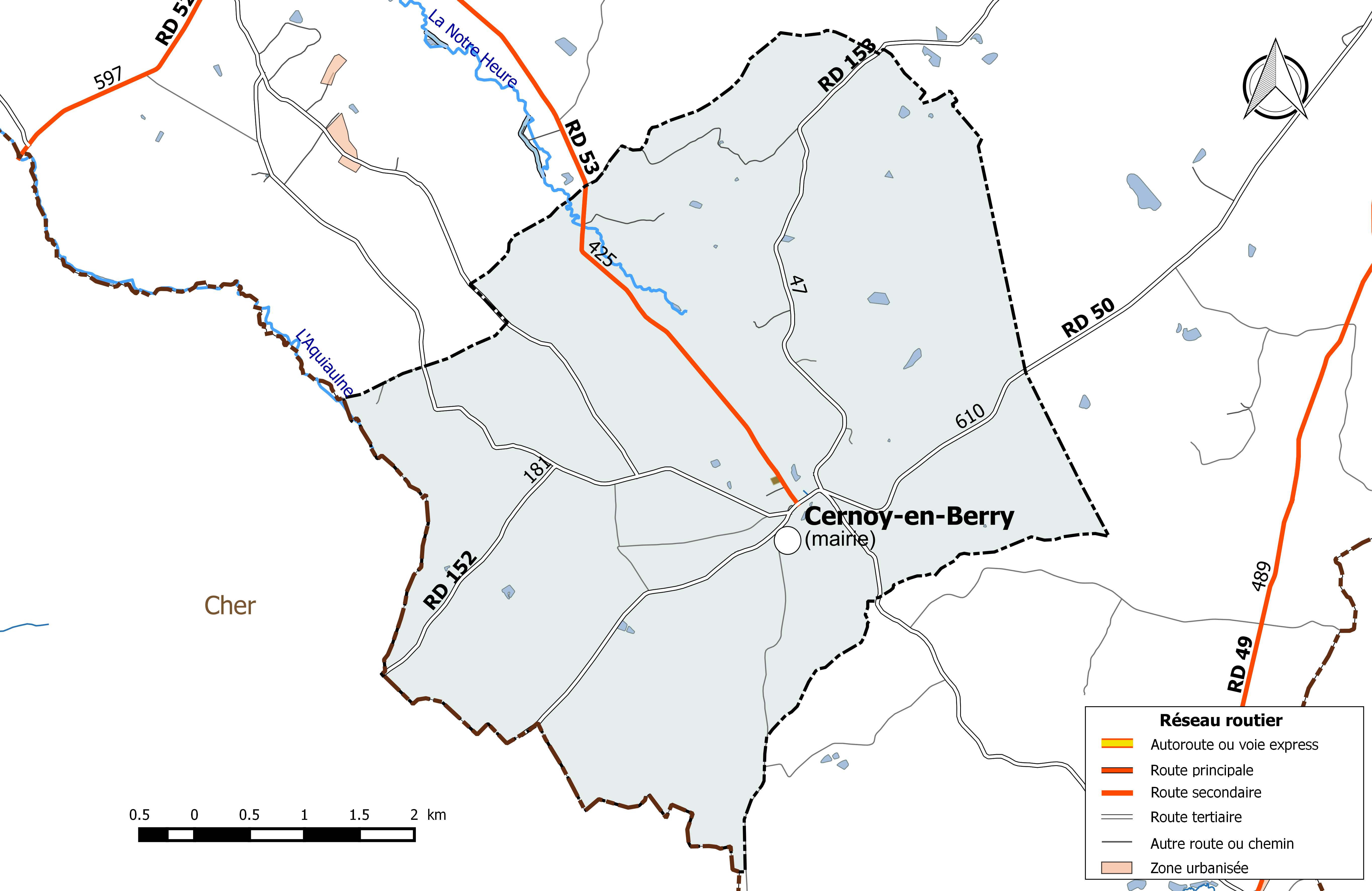 Carte du réseau routier de la commune de Cernoy-en-Berry.